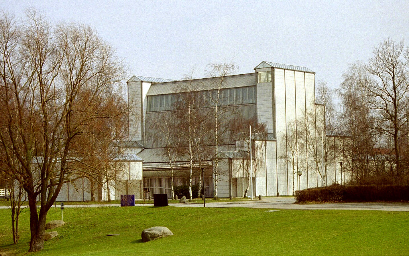 Bagsværd Church, Bagsværd Sogn, Sokkelund Herred, København Amt, Denmark.